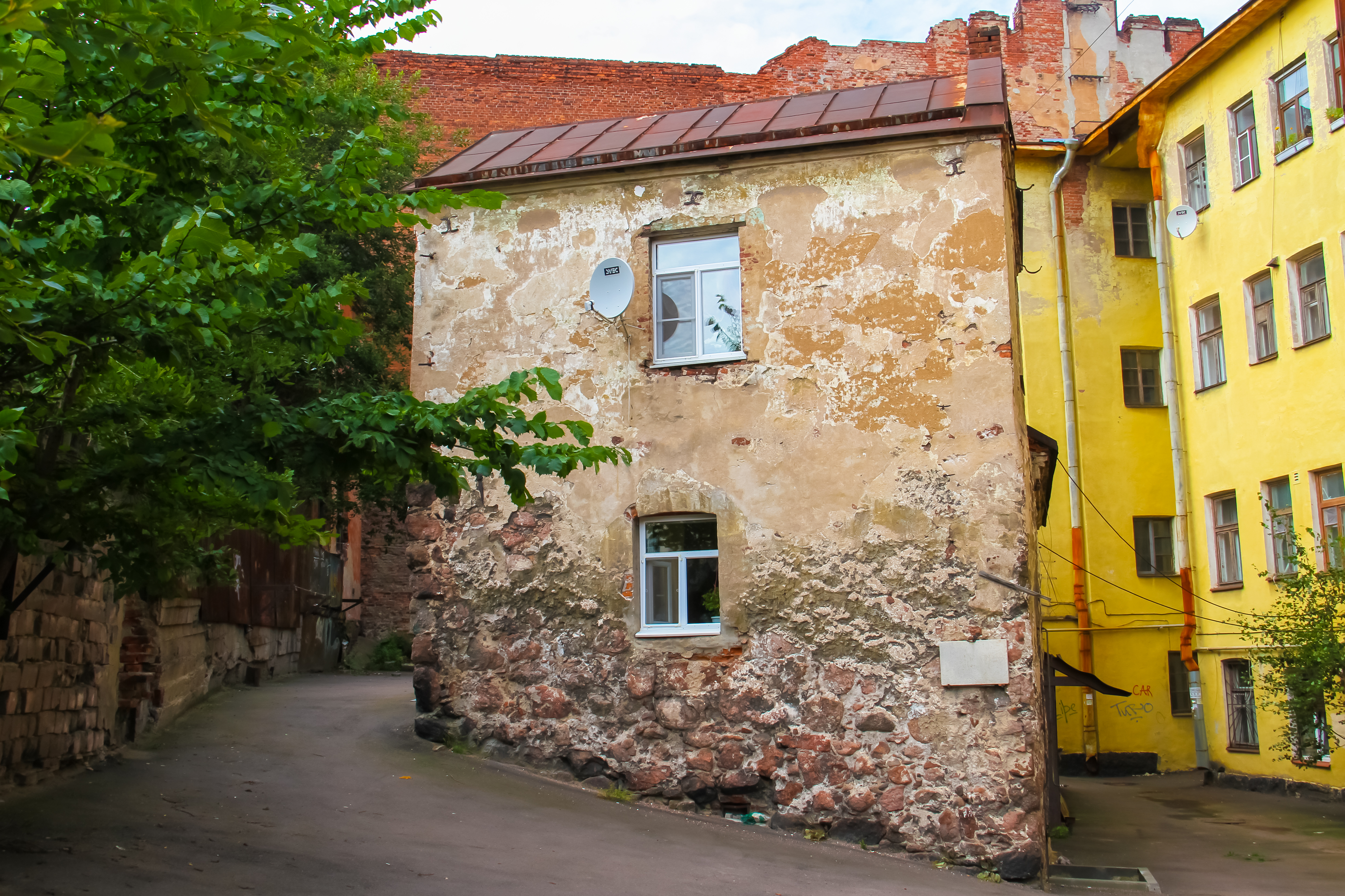 Дом жилой (Санкт-Петербург и Лен.область, Выборг, Крепостная улица, 13-а (бывш. Красина улица, 12))